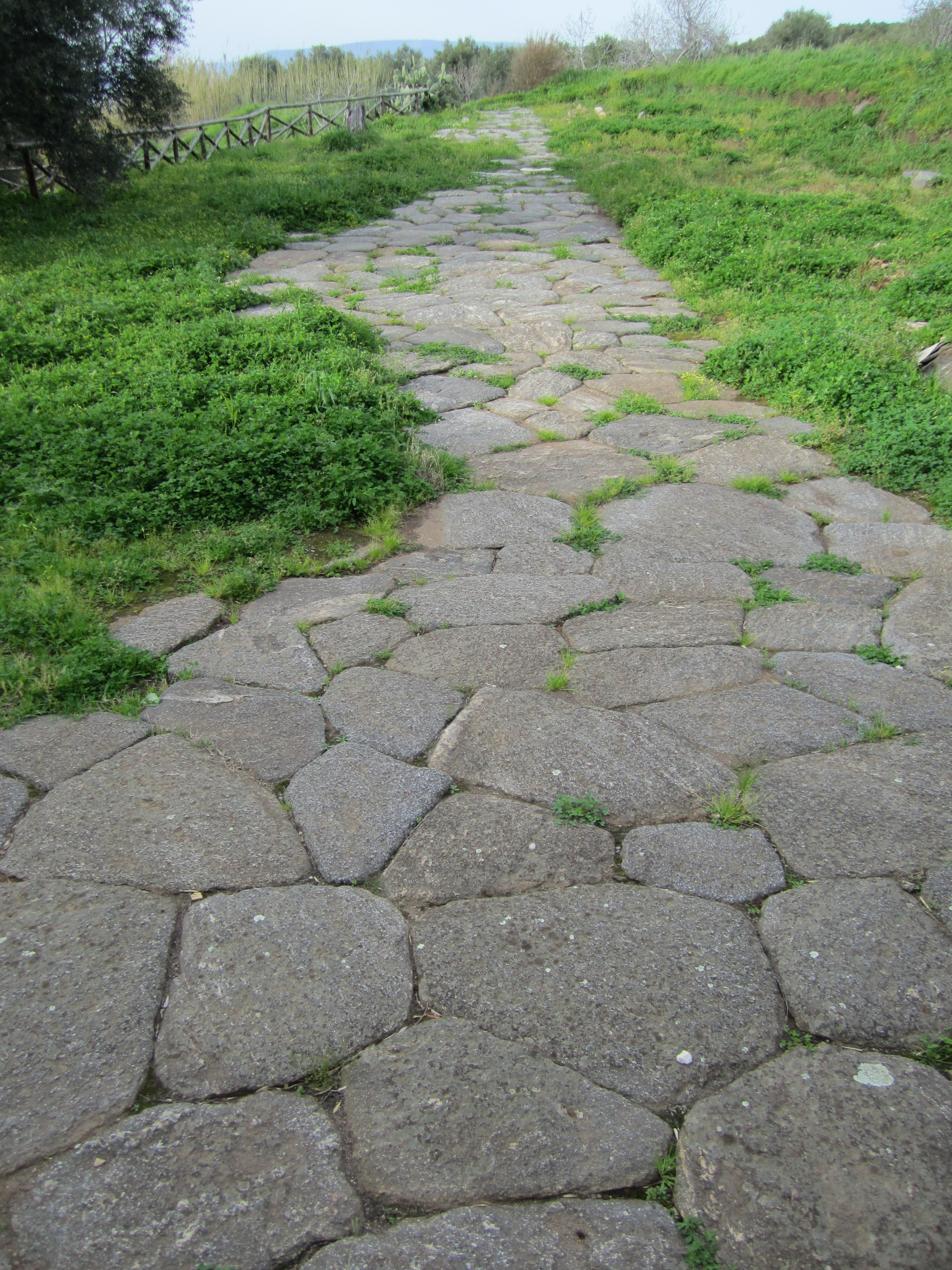 Selciato Romano del Parco Archeologico dei Taureani di Palmi (RC).